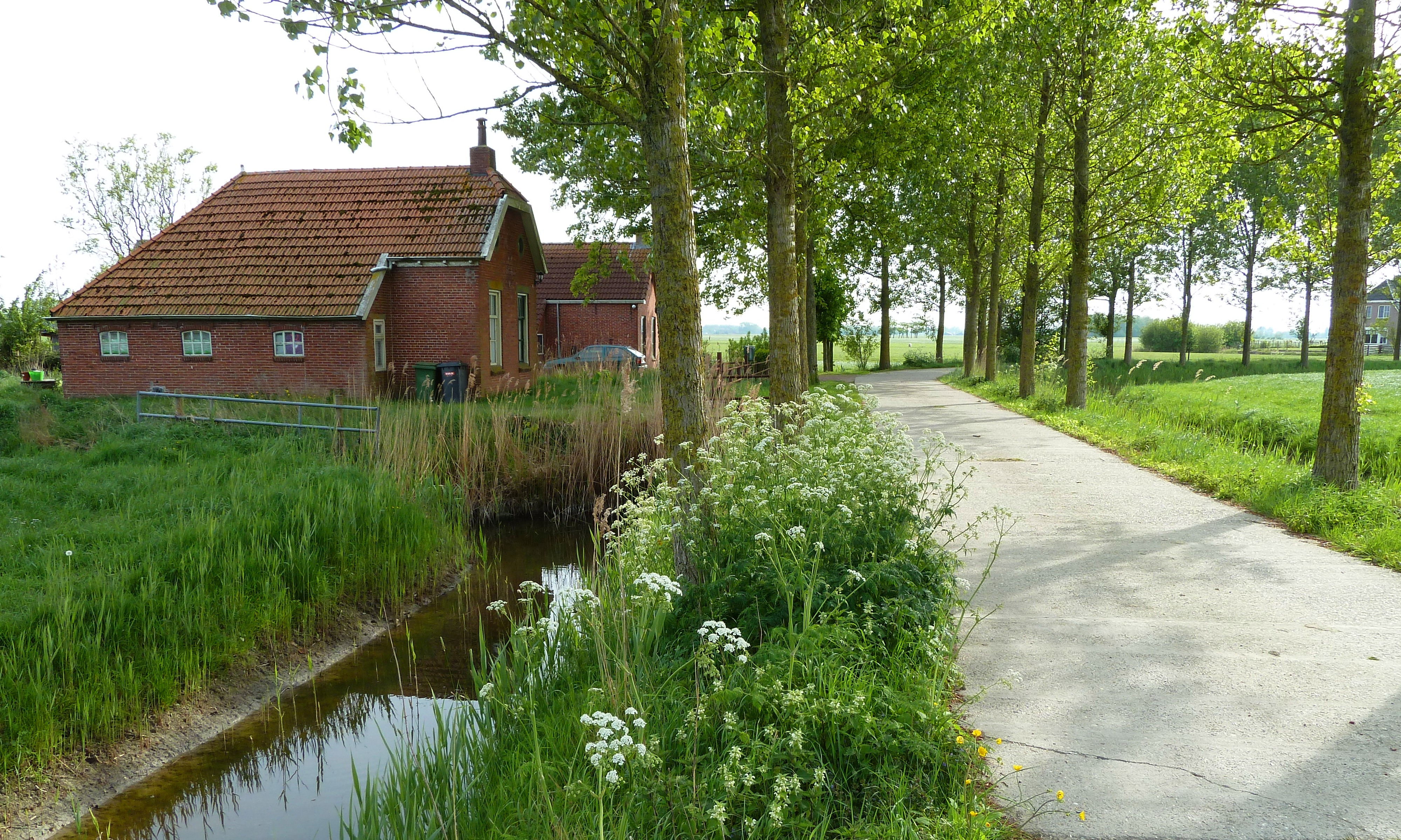 Arbeiderswoningen bij Beswerd (Winsum, Groningen, Nederland). Rechtsachter een glimp van het nieuwe voorhuis van boerderij Oud-Beswerd